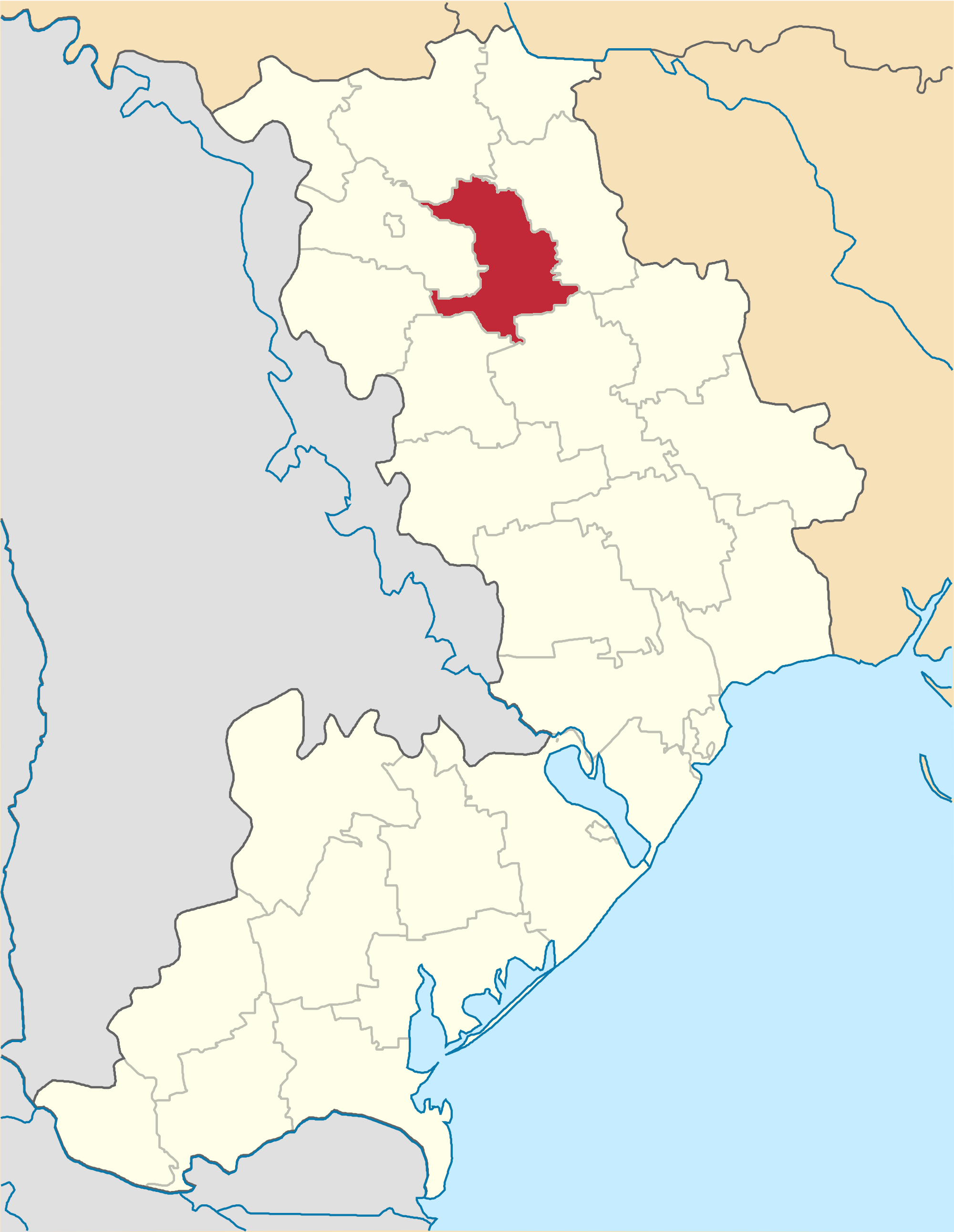 Ananyivskyi-Raion map